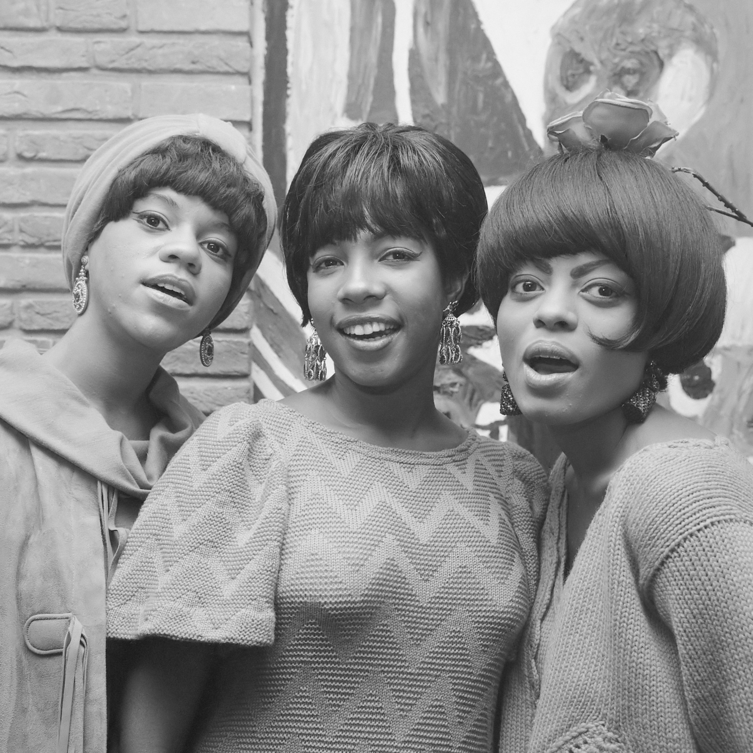 Zanggroep The Supremes in Hilton-hotel aan pers voorgesteld, v.l.n.r. Florence Ballard, Mary Wilson en Diana Ross 30 september 1965